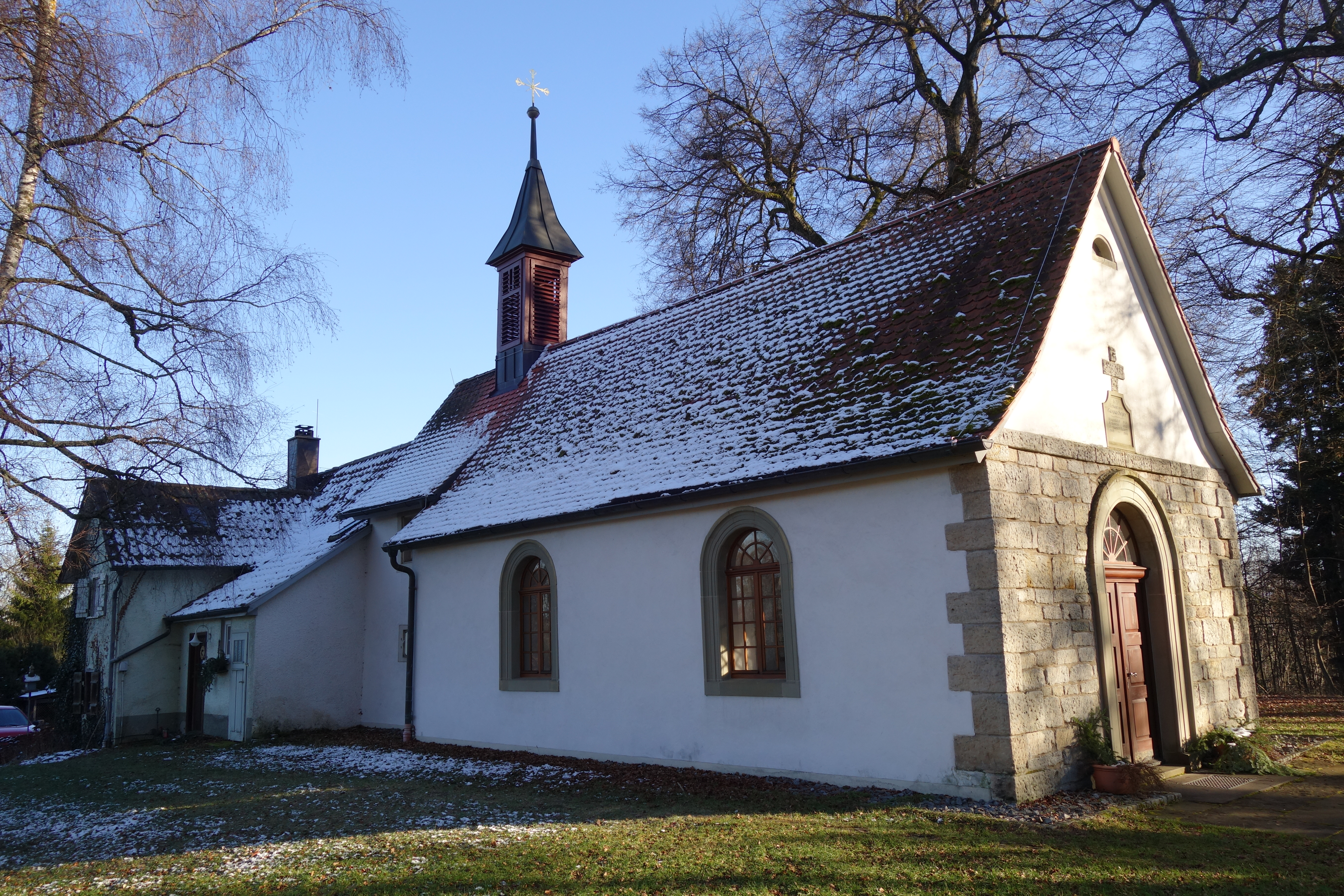 Lorettokapelle Binsdorf